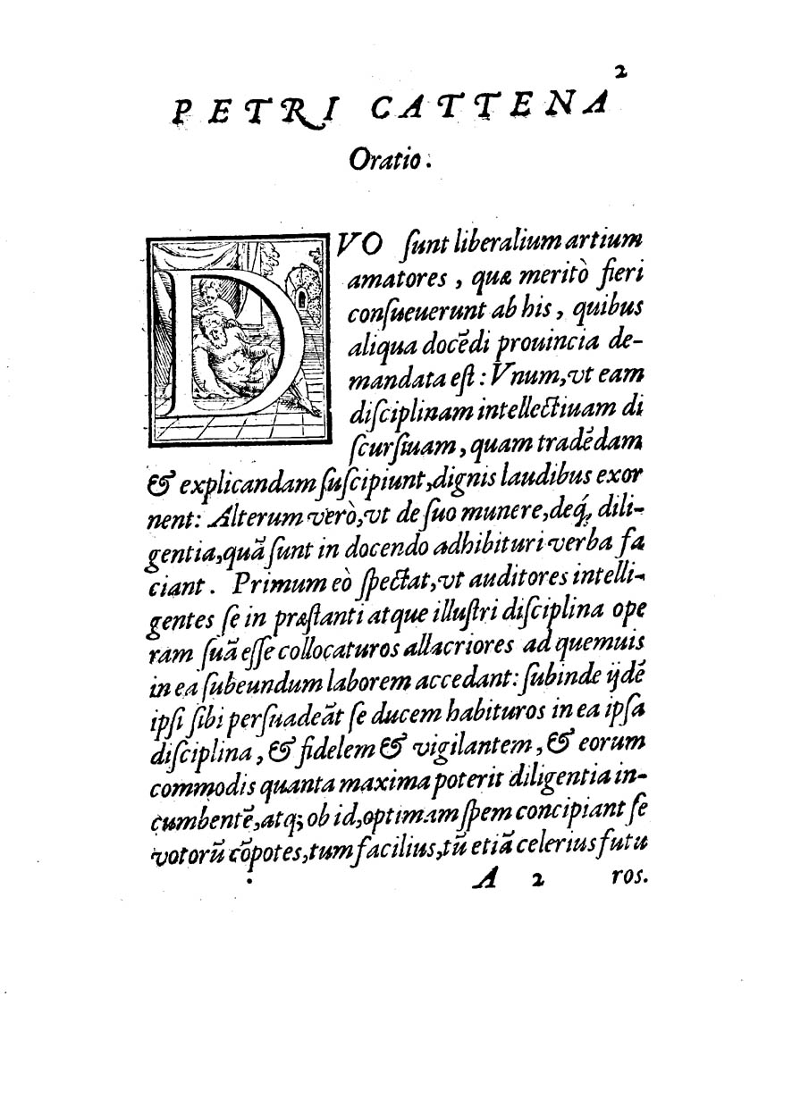 Petri Catena [sic] Oratio pro idea methodi. Ad Nobilem Federicum Sforciam. - Patauij : apud Gratiosum Perchacinum, 1563. - 8 c. ; 4º .